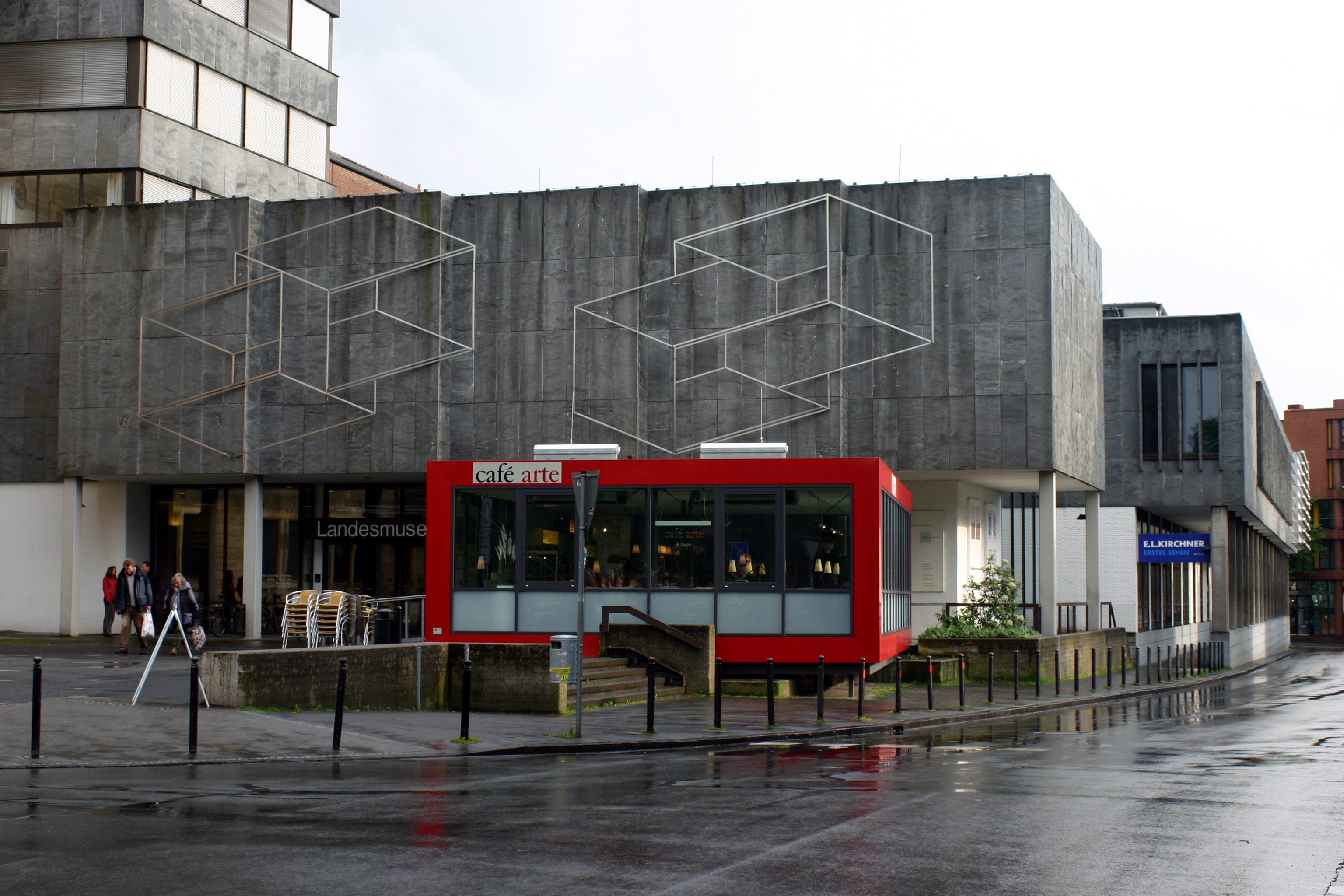 Josef Albers: Zwei Supraporten (1974) Standort: Westfälisches Landesmuseum für Kunst- und Kulturgeschichte, Haupteingang